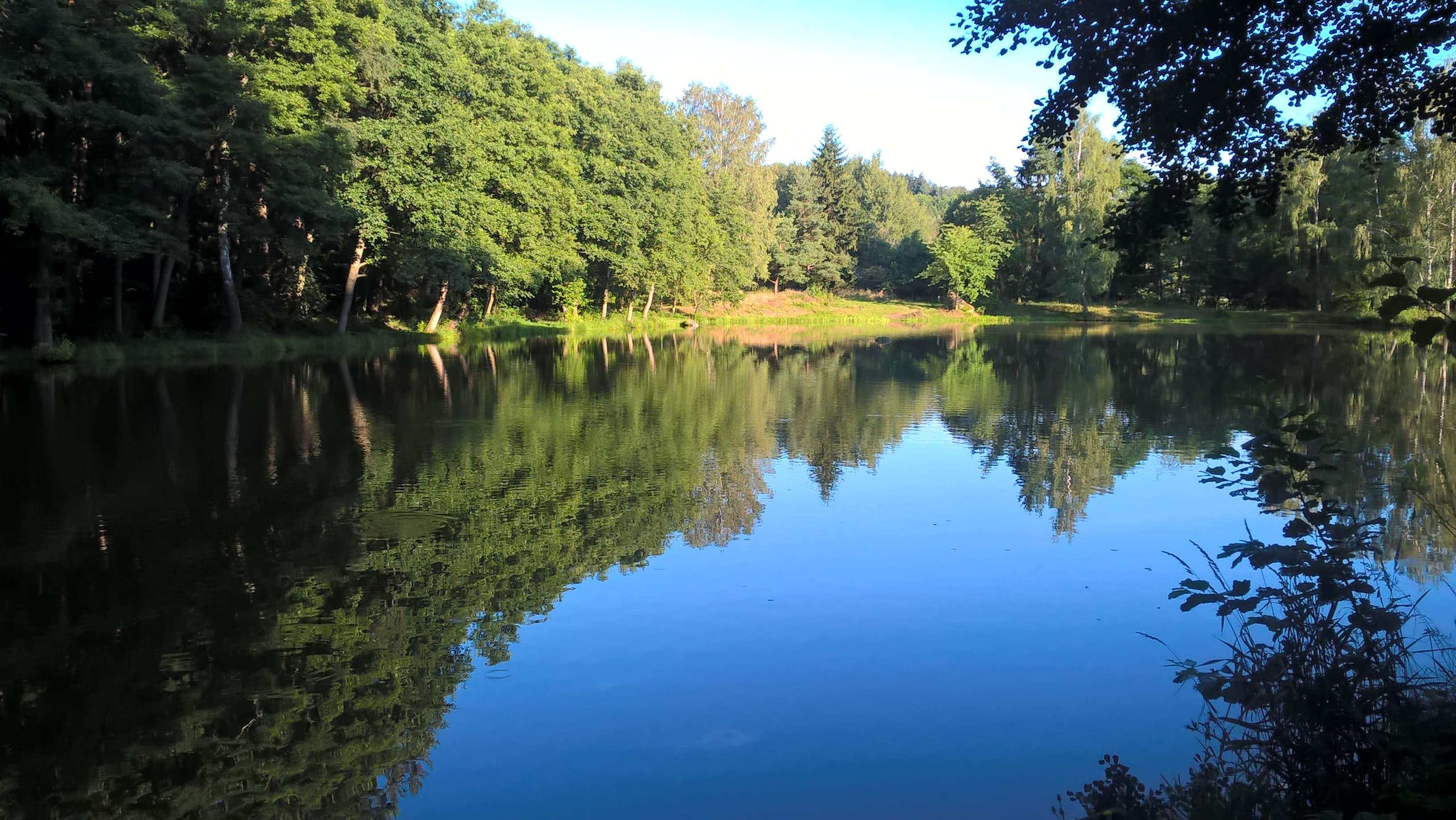 rybník v létě 2016